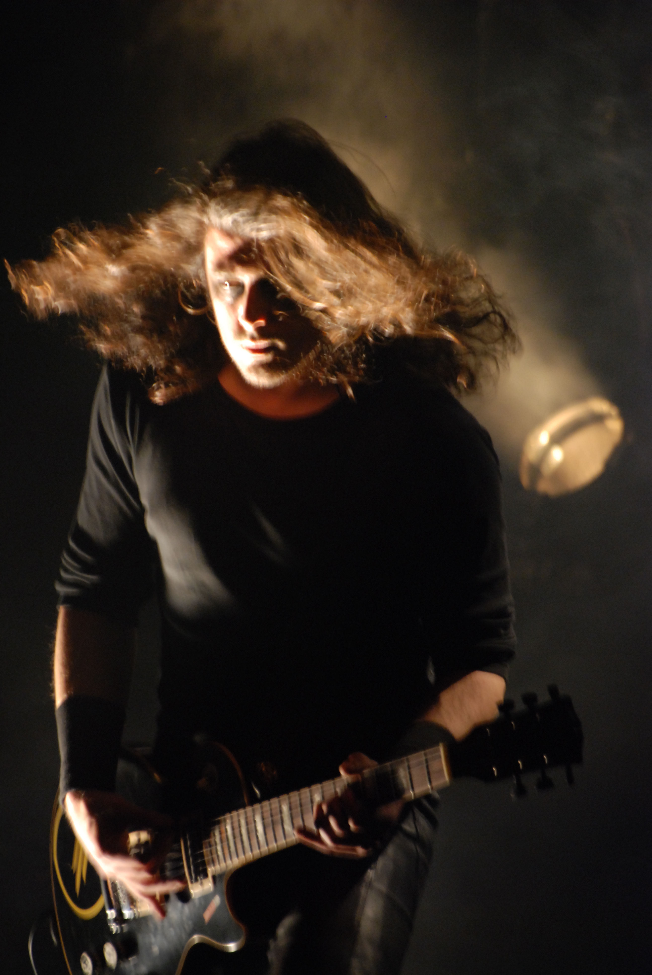 Koncert Moonspell'a (Ricardo Amorim) w klubie Studio w Krakowie